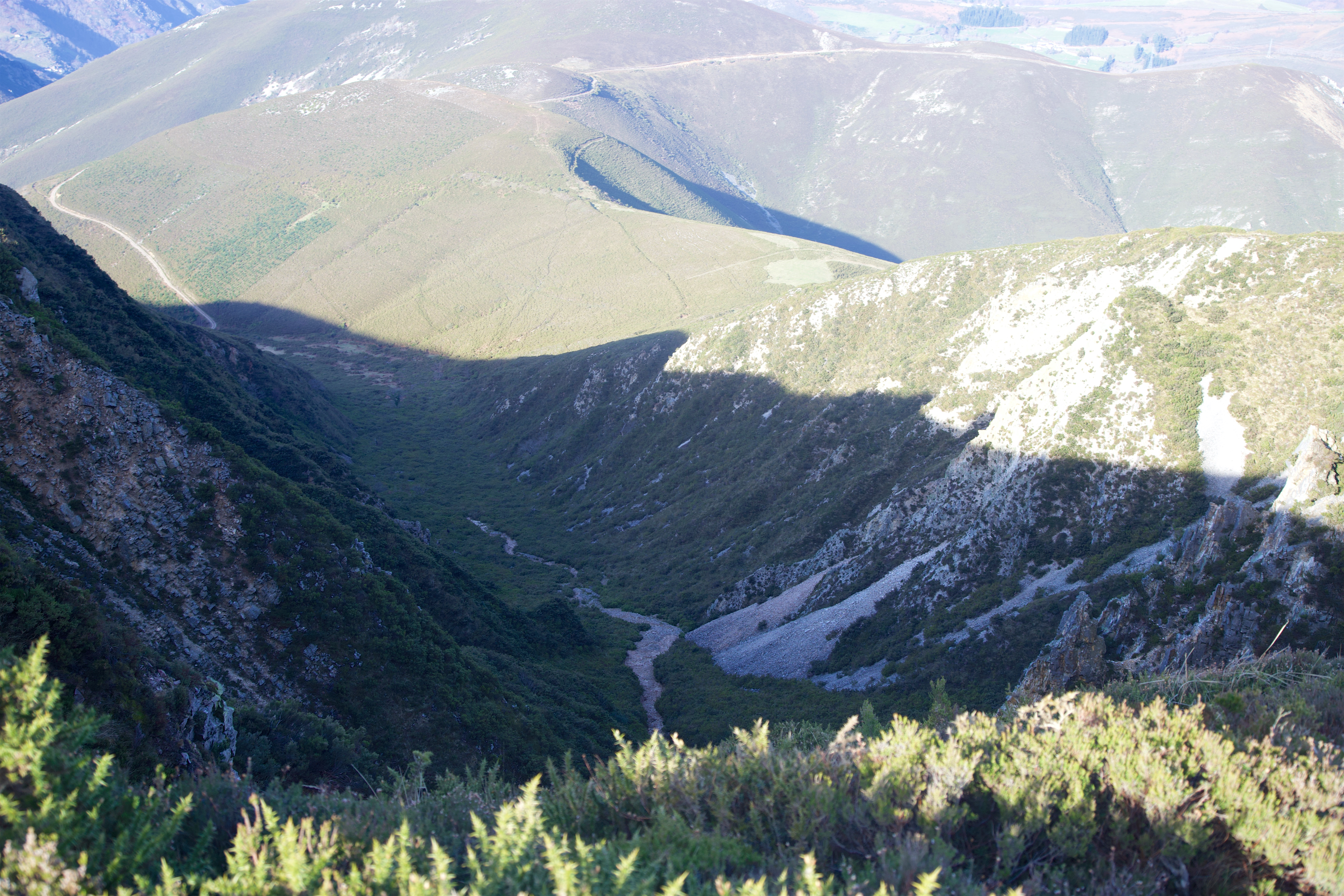 Fana de Freitas, yacimiento arqueológico de una mina romana